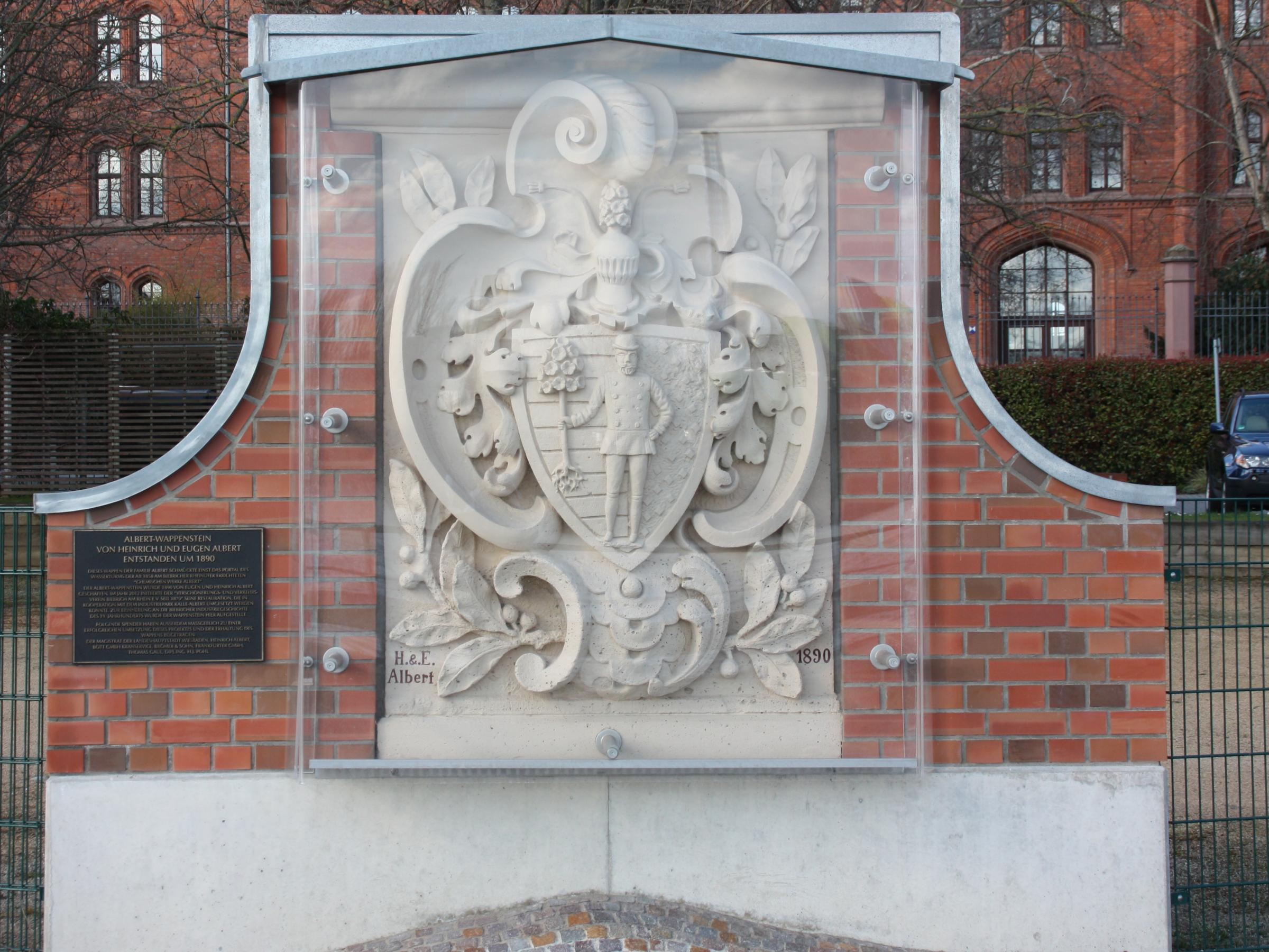 Der Albert-Wappenstein von 1890 am Werk Albert in Wiesbaden-Biebrich. Die Chemischen Werke H. & E. Albert wurden 1858 von Heinrich Albert (1835–1908) und dessen Bruder Eugen Albert (1830–1879) gegründet. In Bildmitte ist der Vater, Oberförster Konrad Albert dargestellt.